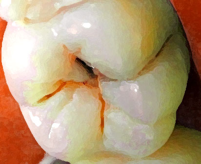 Dental caries